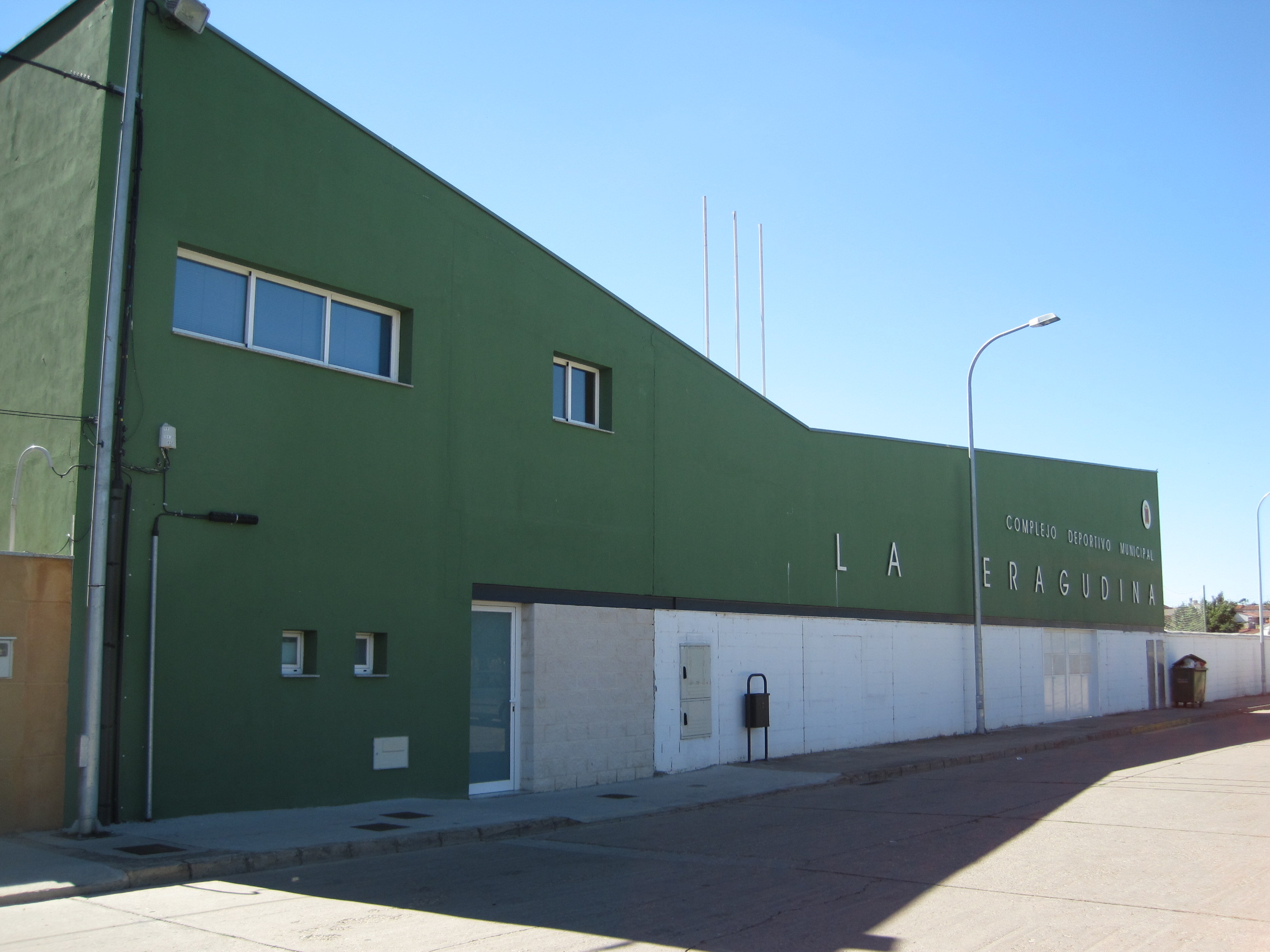 Fachada del complejo deportivo La Eragudina, en Astorga (provincia de León, España).